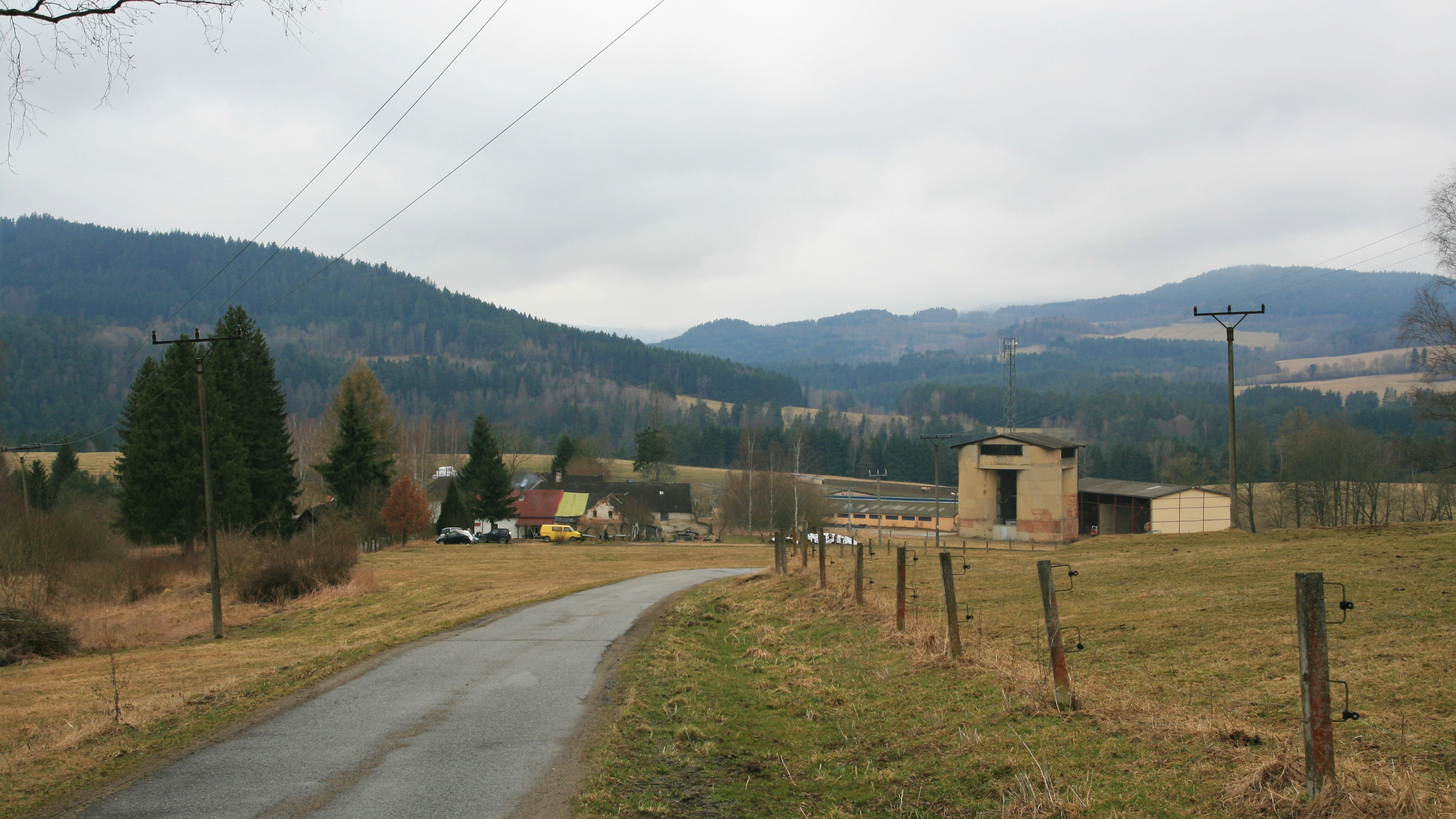 Vesnice Čeřín, část obce Rožmitál na Šumavě v okrese Český Krumlov. Celkový pohled na ves a zemědělský statek ze silnice od východu.